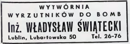 Reklama prasowa wytwórni inż. Świąteckiego zamieszczona w Technice Lotniczej w 1939 r.